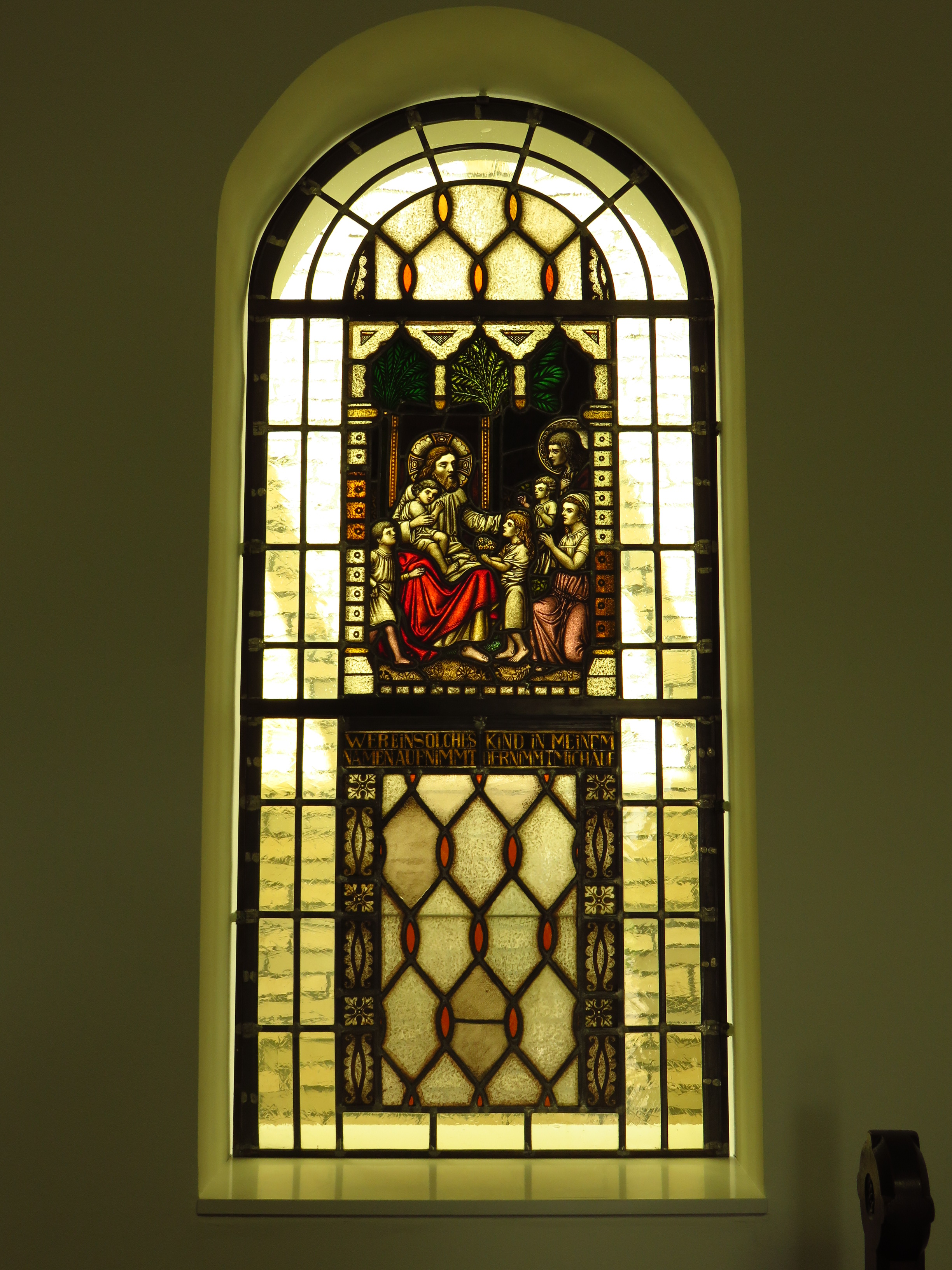 Bild aus der Kapelle St. Lambertus in Immerath (neu)